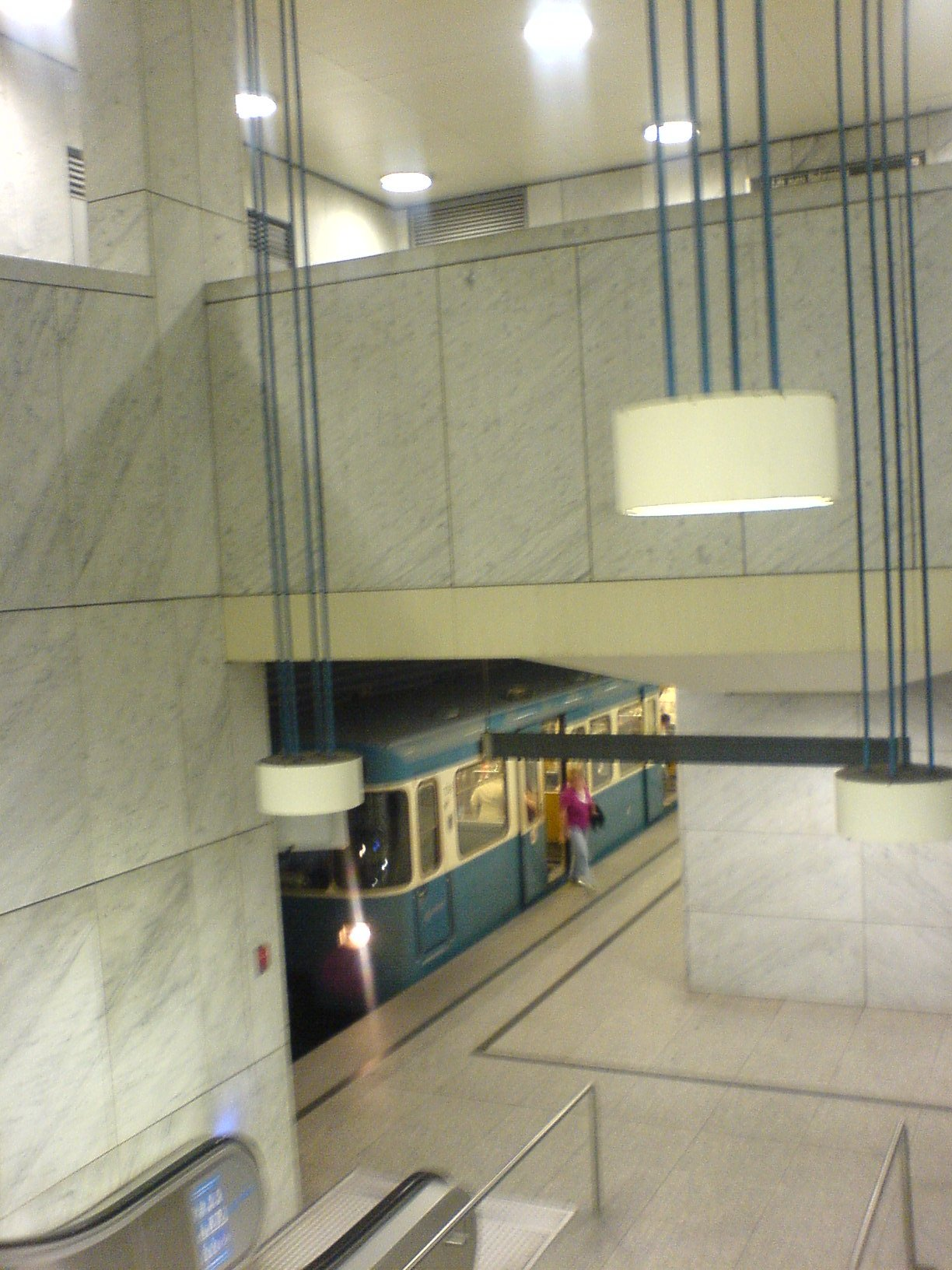 U-Bahnhof Arabellapark, München - Zwischengeschoß: Zugang/Ausgang zum/vom Bahnsteig (Englschalkinger Str.).